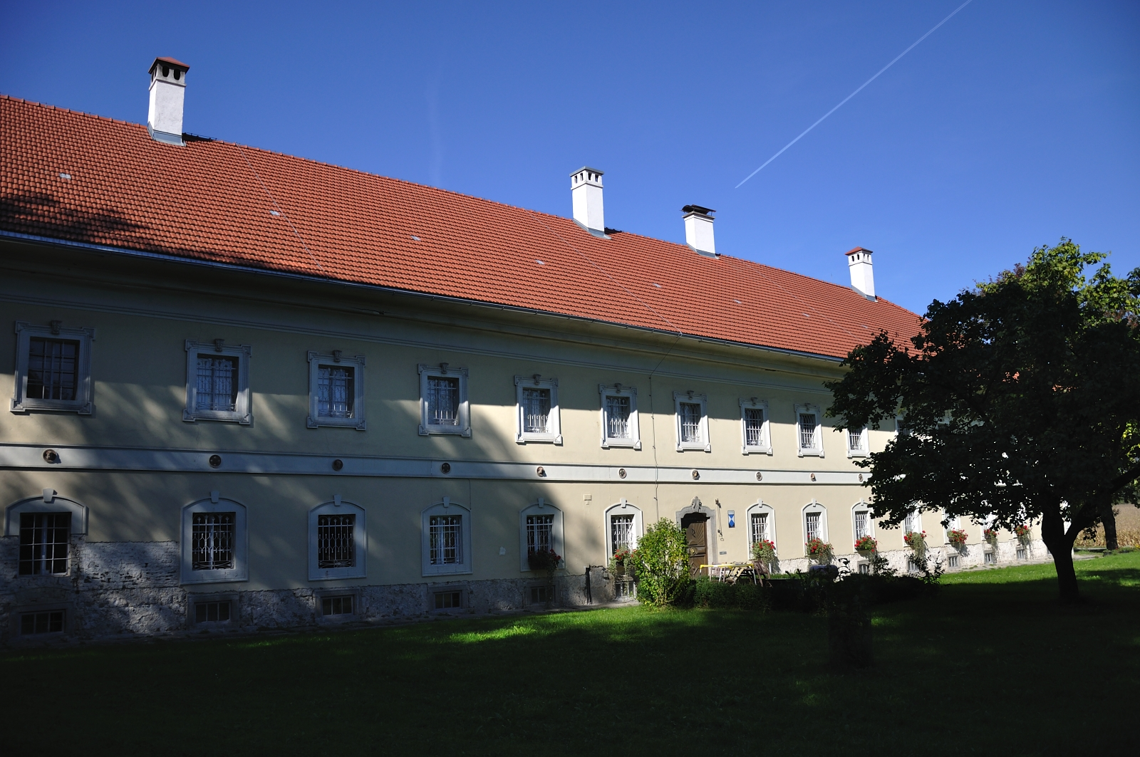 Freilichtmuseum Sumerauerhof, Haustür an der Ostseite